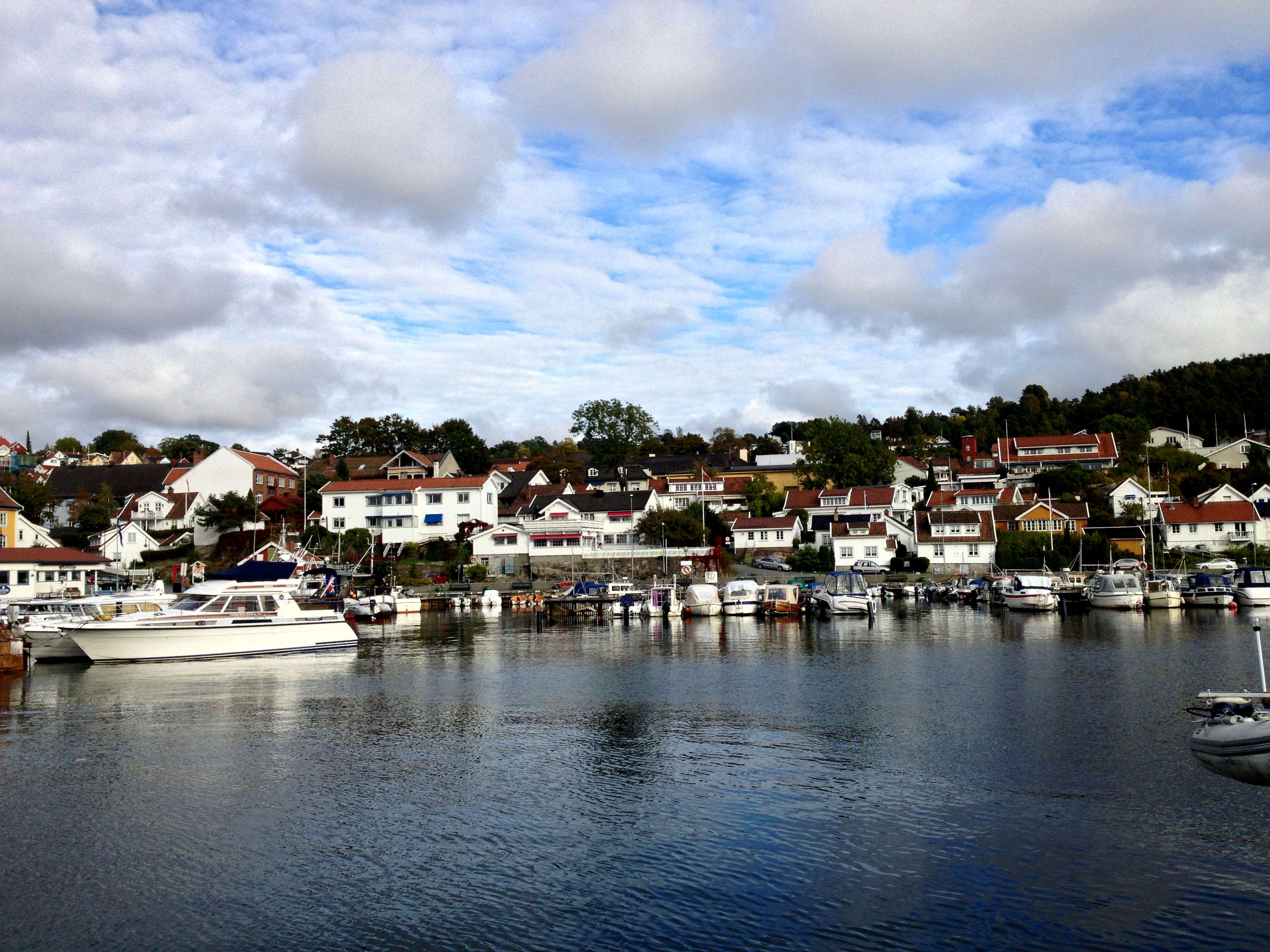 Drøbak fra fyrtårnet